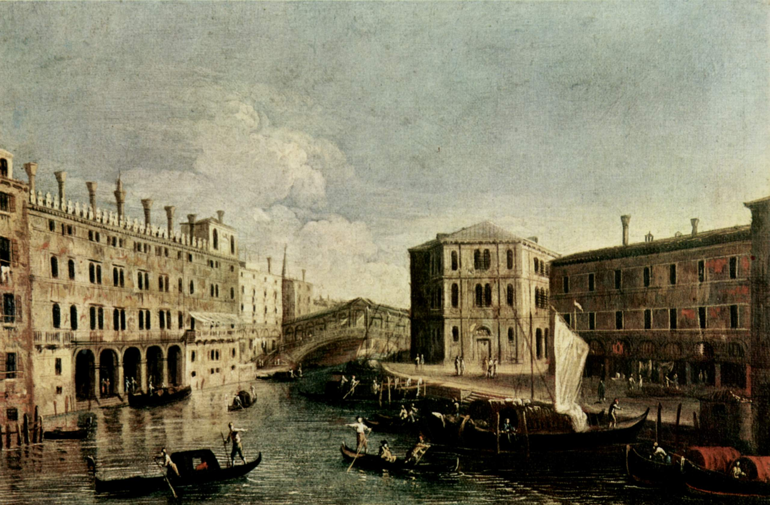 Sulla sinistra si nota il Fondaco dei Tedeschi, che rivela ancora tracce dell'originale decorazione ad affresco del Tiziano.